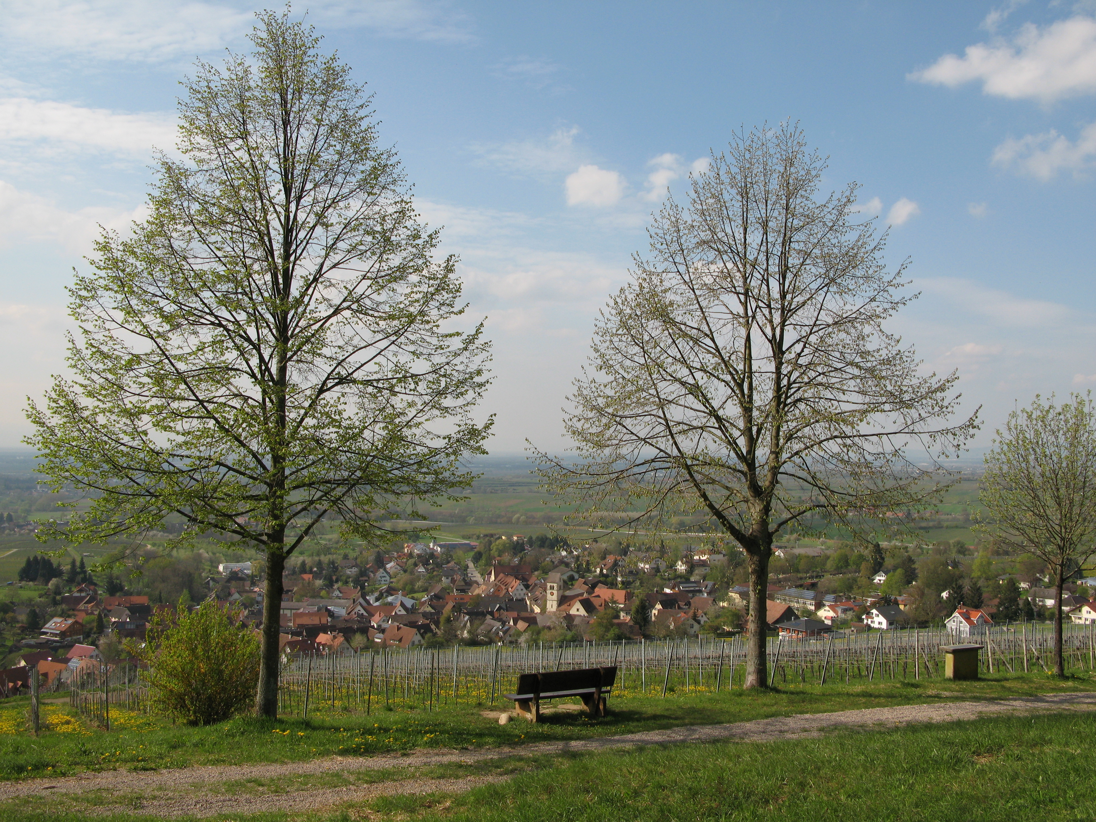 Britzingen am Fernwanderweg Markgräfler Wiiwegli im Markgräflerland.